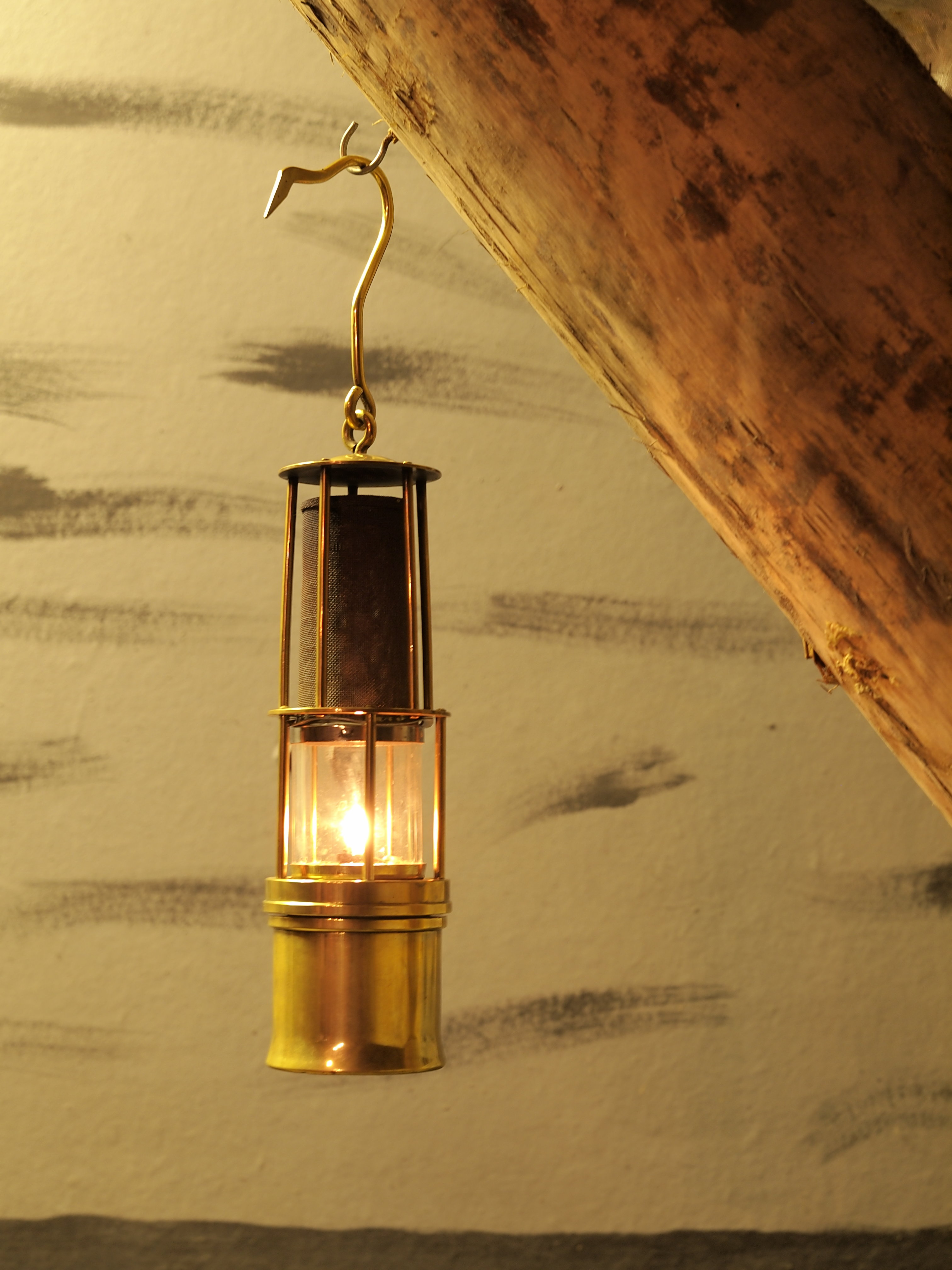 Gelsenkirchen, Wetterlampe im Bergbaustollen